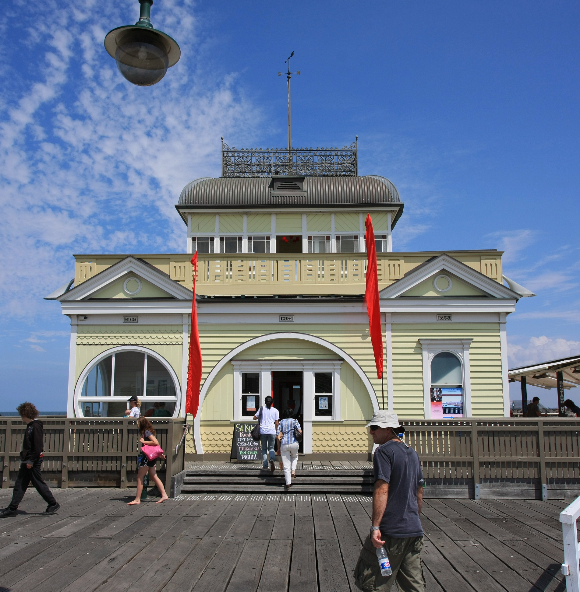 WM in St Kilda